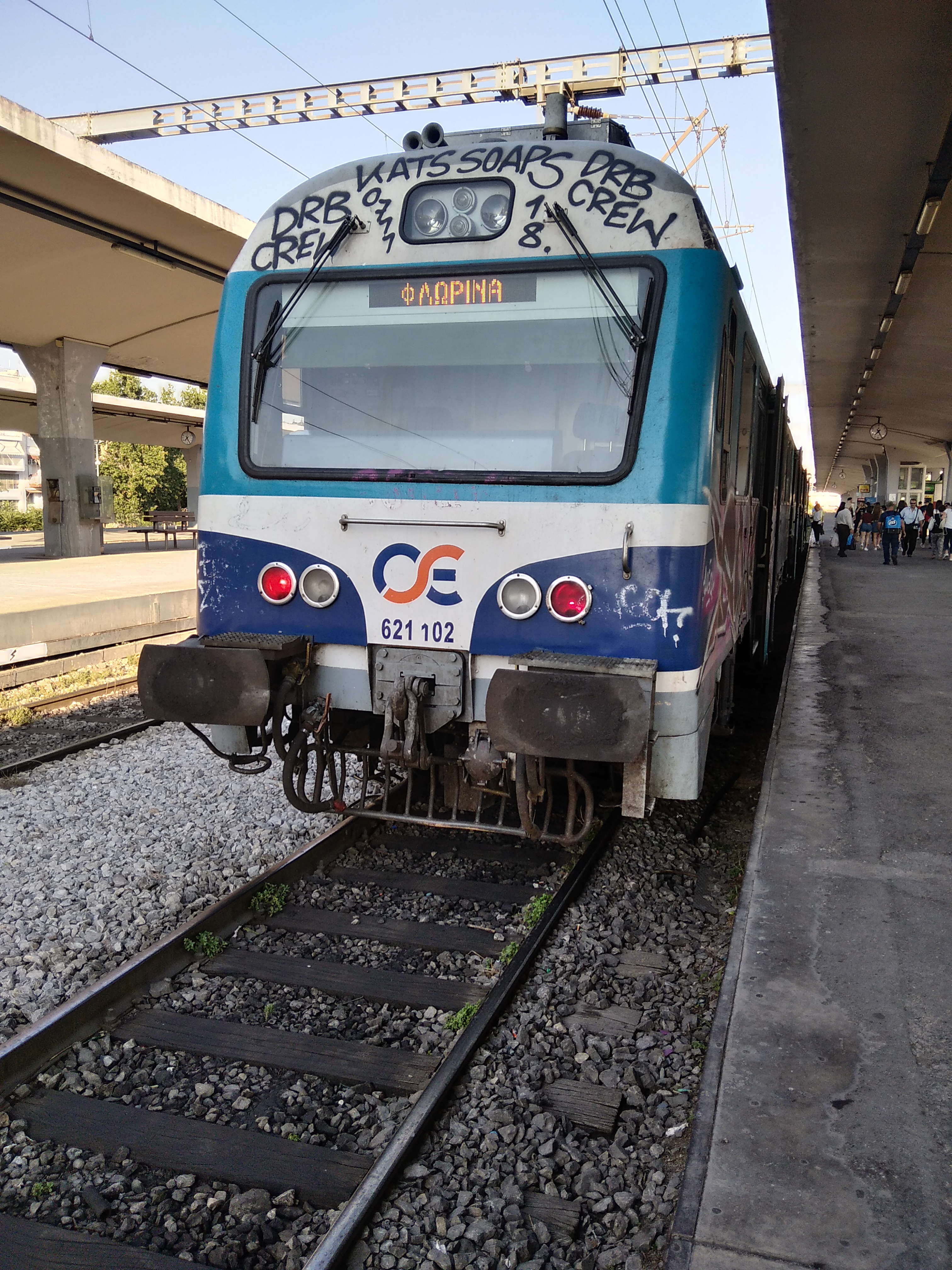 27 Ιουνίου 2020 στον Σ.Σ. Θεσσαλονίκης (ΜΑΝ S 2000 EN)